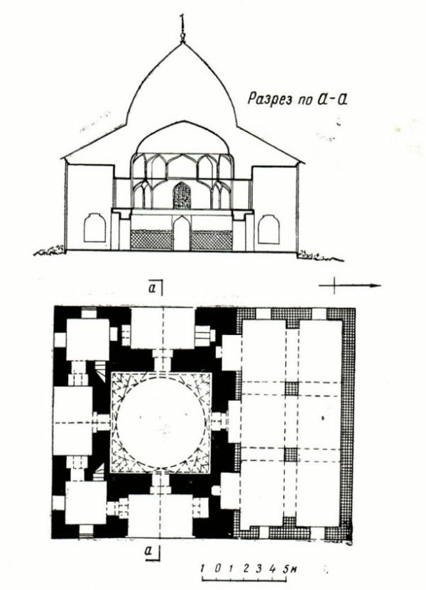 Şeyx Cüneyd türbəsinin planı və kəsiyi